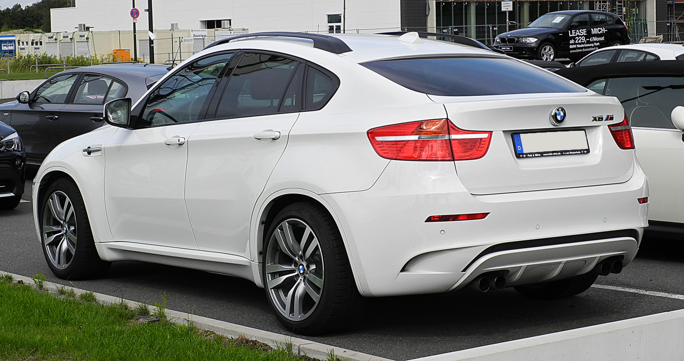 BMW X6 M (E71)